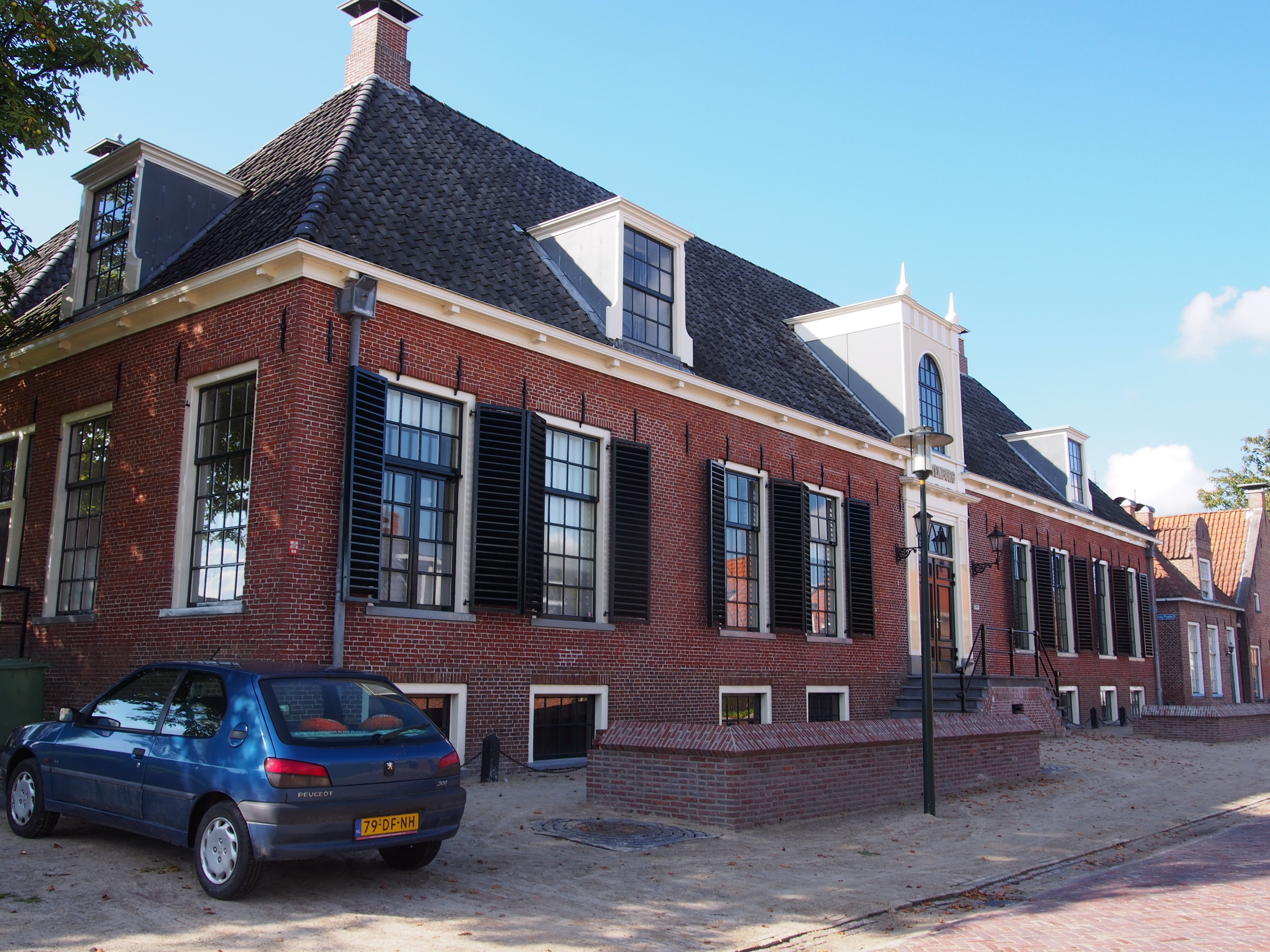 Oostenburg, Oostenburgstraat 2, Kollum